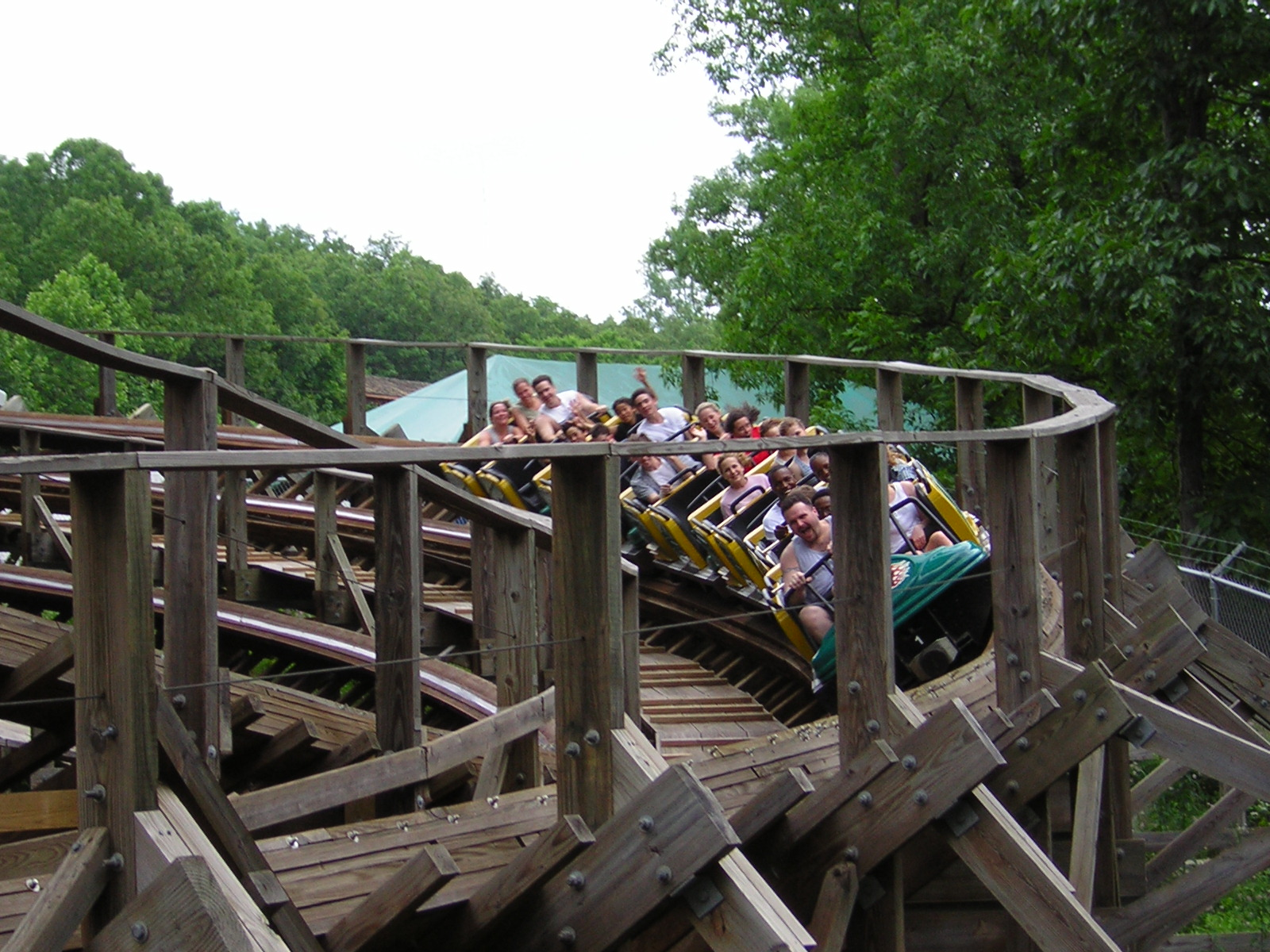 De achtbaan The Boss.Coaster-2004-214